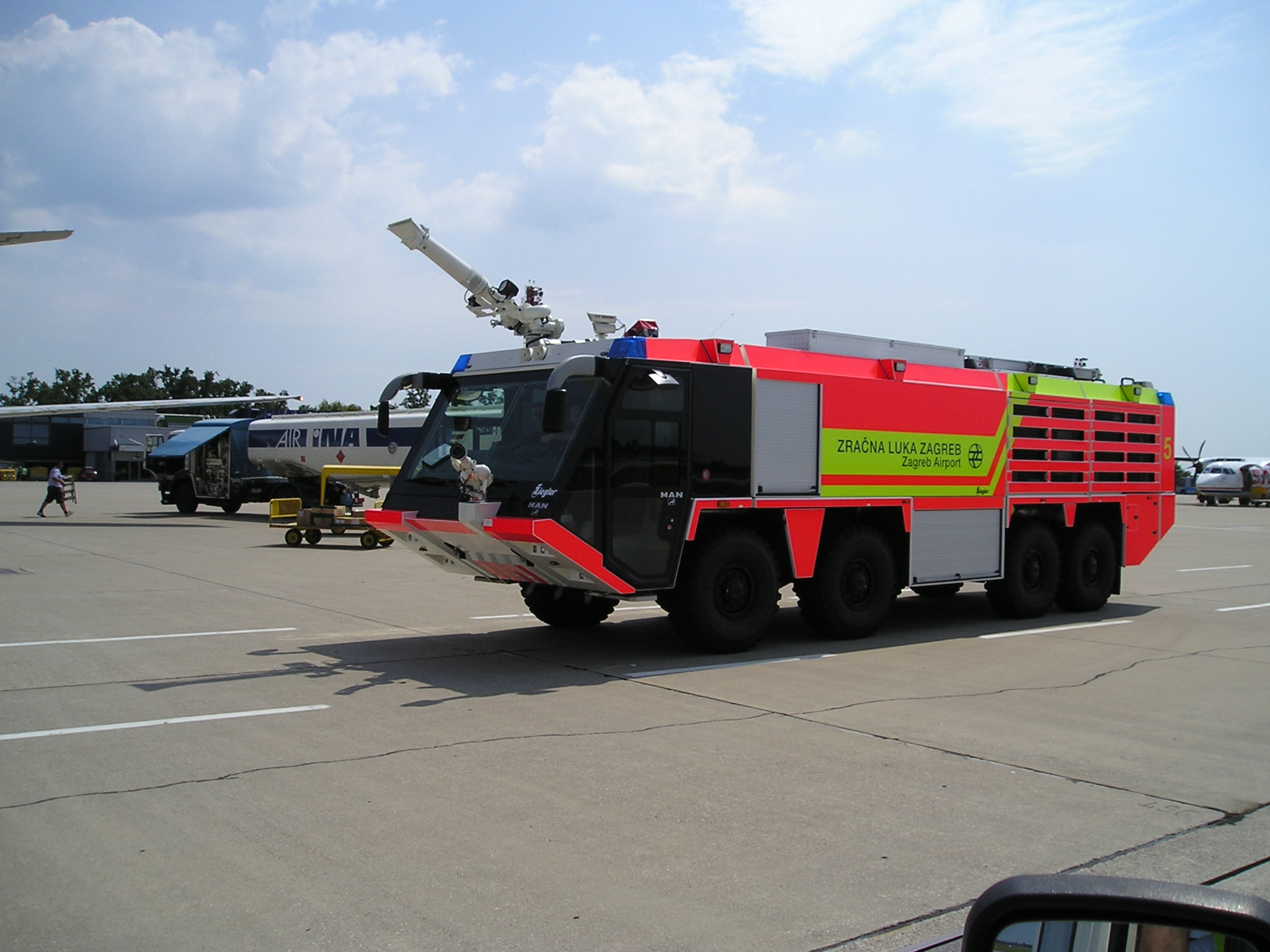 Firenfighting vehicle Ziegler Z8